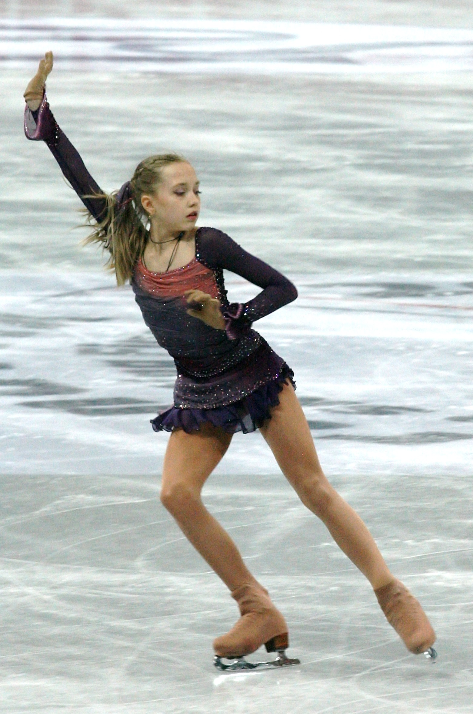 Елена Родионова (Россия) на финале Гран-при среди юниоров 2012-2013. Произвольная программа.